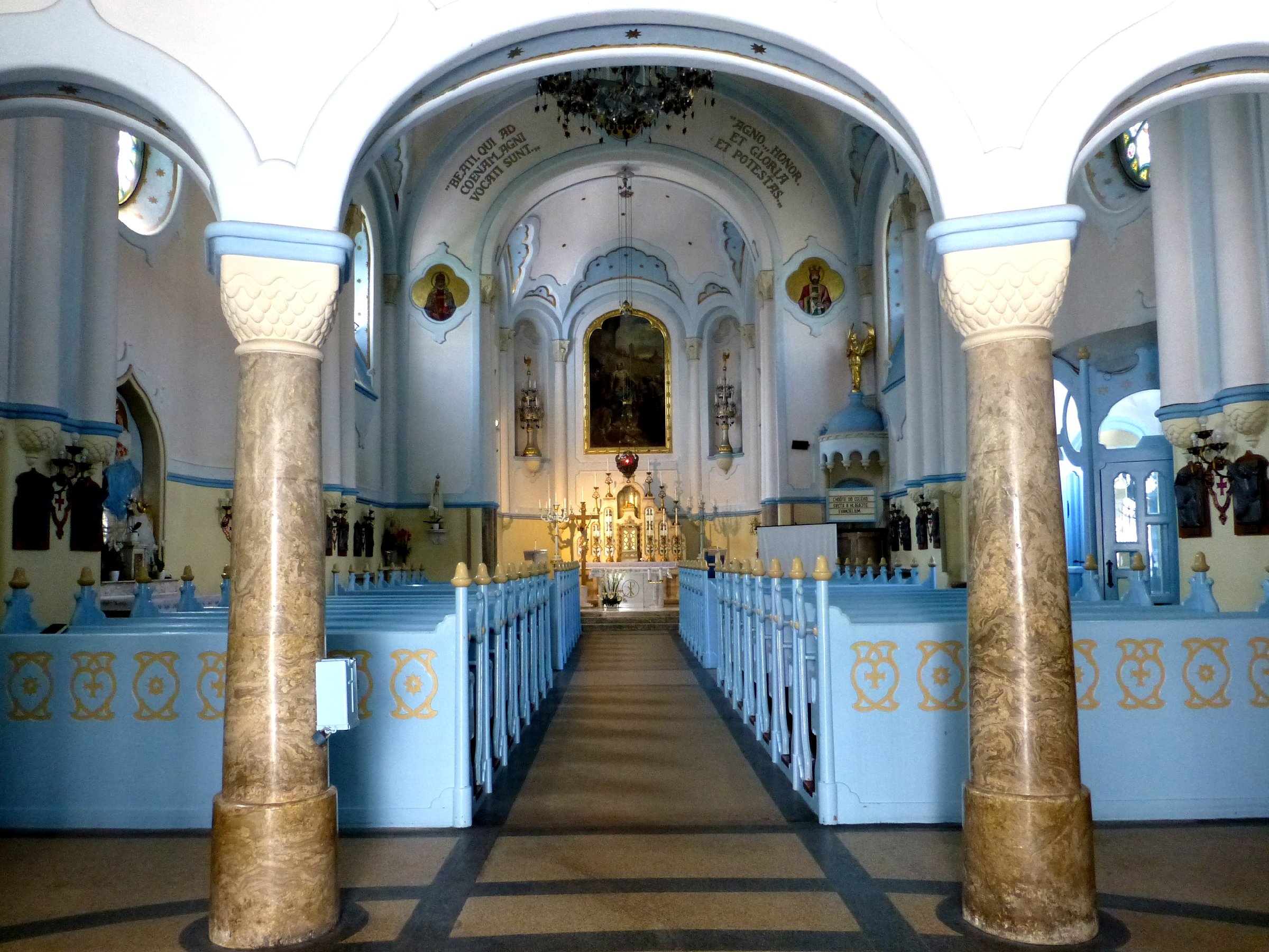 Kostol svätej Alžbety Blue Church Bratislava Slovakia